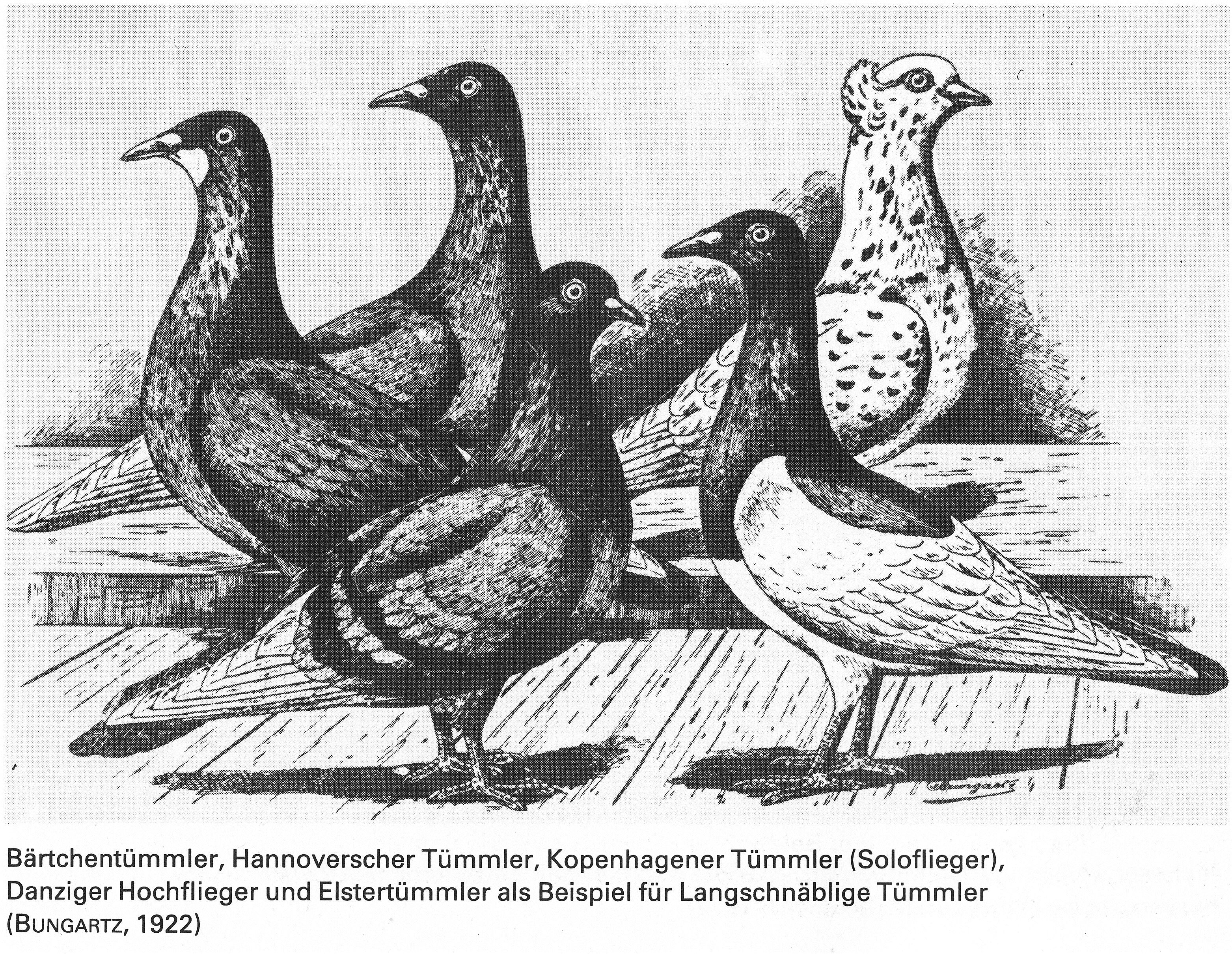 Bärtchentümmler, Hannoverscher Tümmler, Kopenhagener Tümmler (Soloflieger), Danziger Hochflieger und Elstertümmler als Beispiel für Langschnäblige Tümmler (BUNGARTZ, 1922)